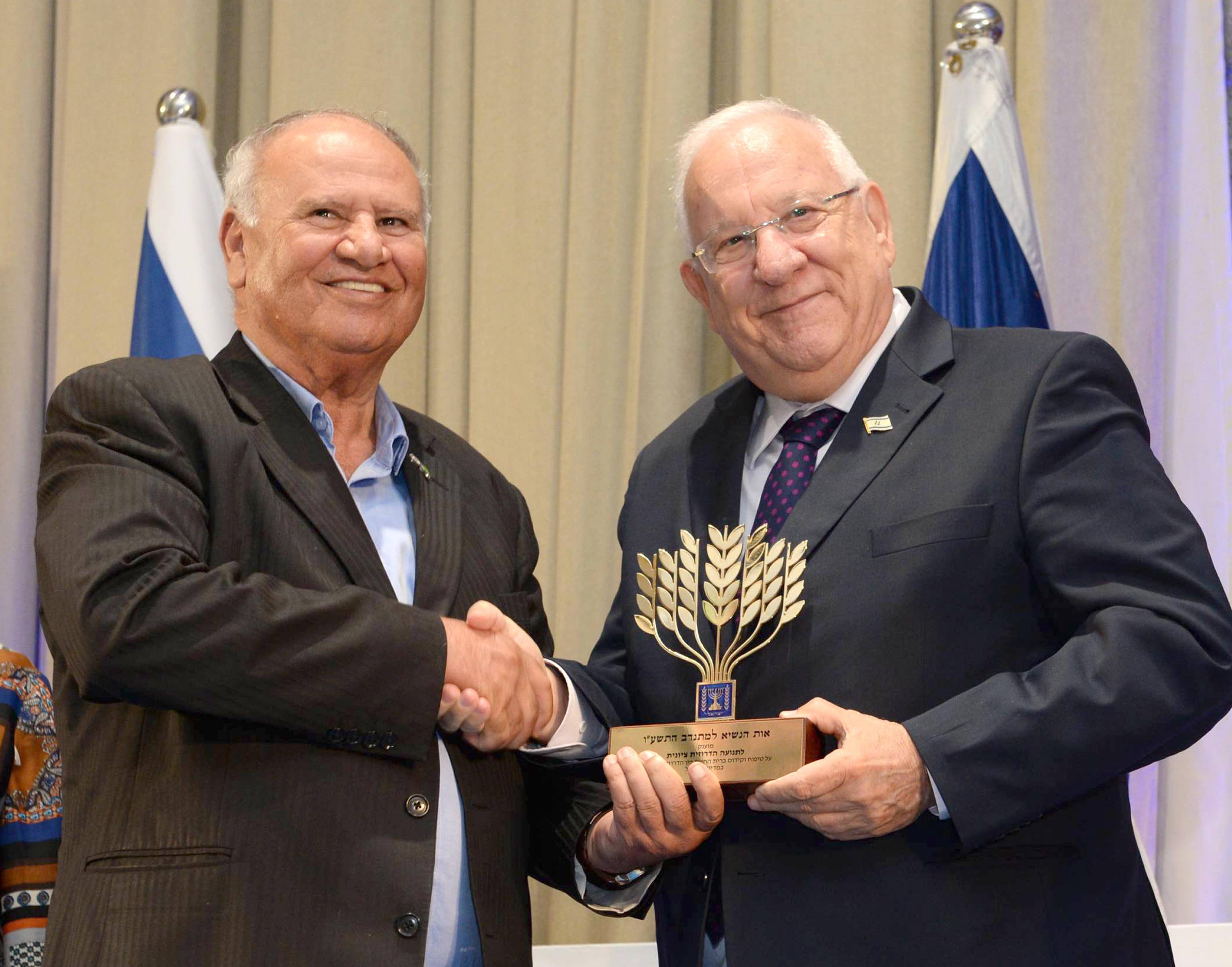 נשיא מדינת ישראל ראובן ריבלין מעניק את אות הנשיא למתנדב לשנת תשע"ו באירוע חגיגי בבית הנשיא לתנועה הדרוזית ציונית